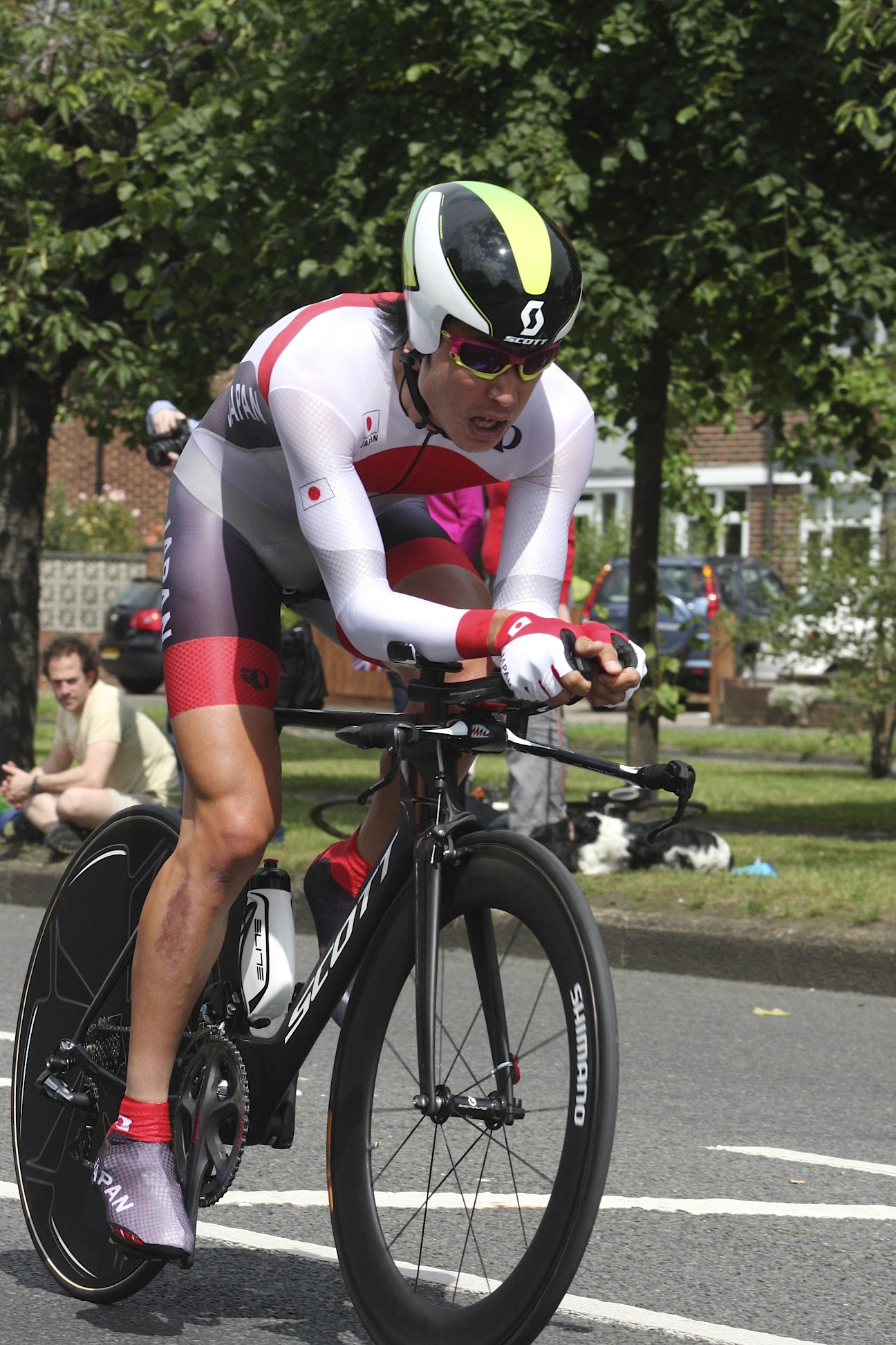 Fumiyuki_Beppu_JAP